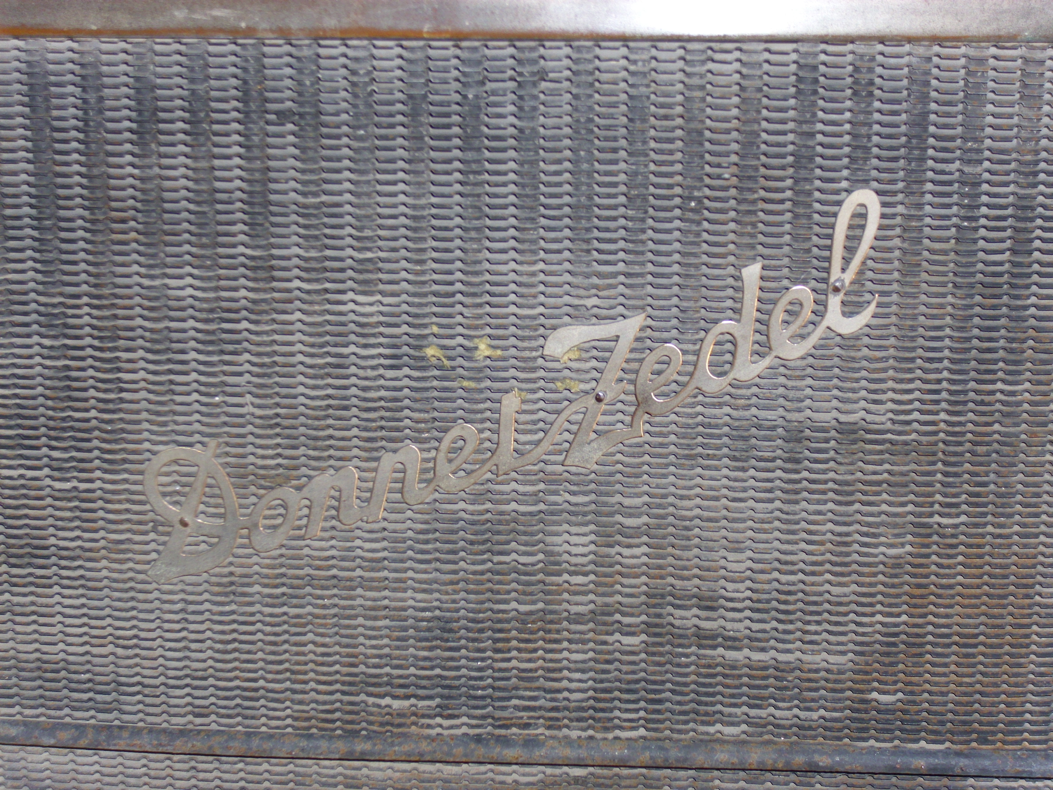 Emblem Donnet-Zedel